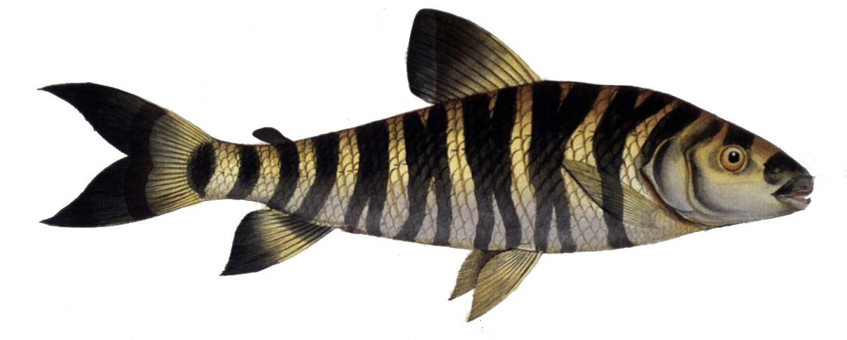 Leporinus fasciatus